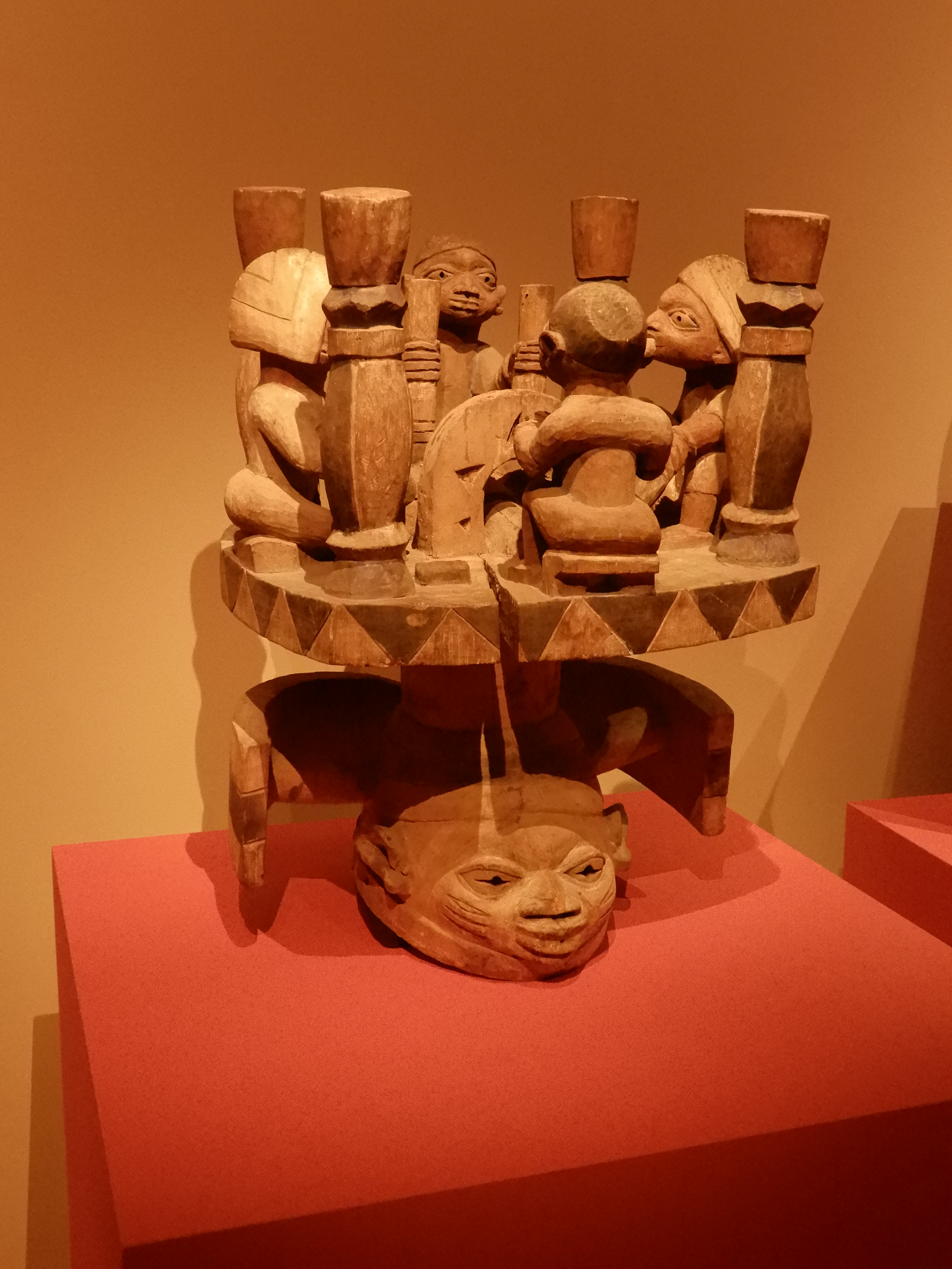 Ce masque Gélédé représente un forgeron et ses assistants autour de sa forge. Réalisé par Alaiye Adeisa Etuobe au milieu du 20e siècle. Bois, teinture, pigments bleus. Conservé au Fowler Museum at UCLA, X.70.990 don de Mme et M. Harry Hughes.